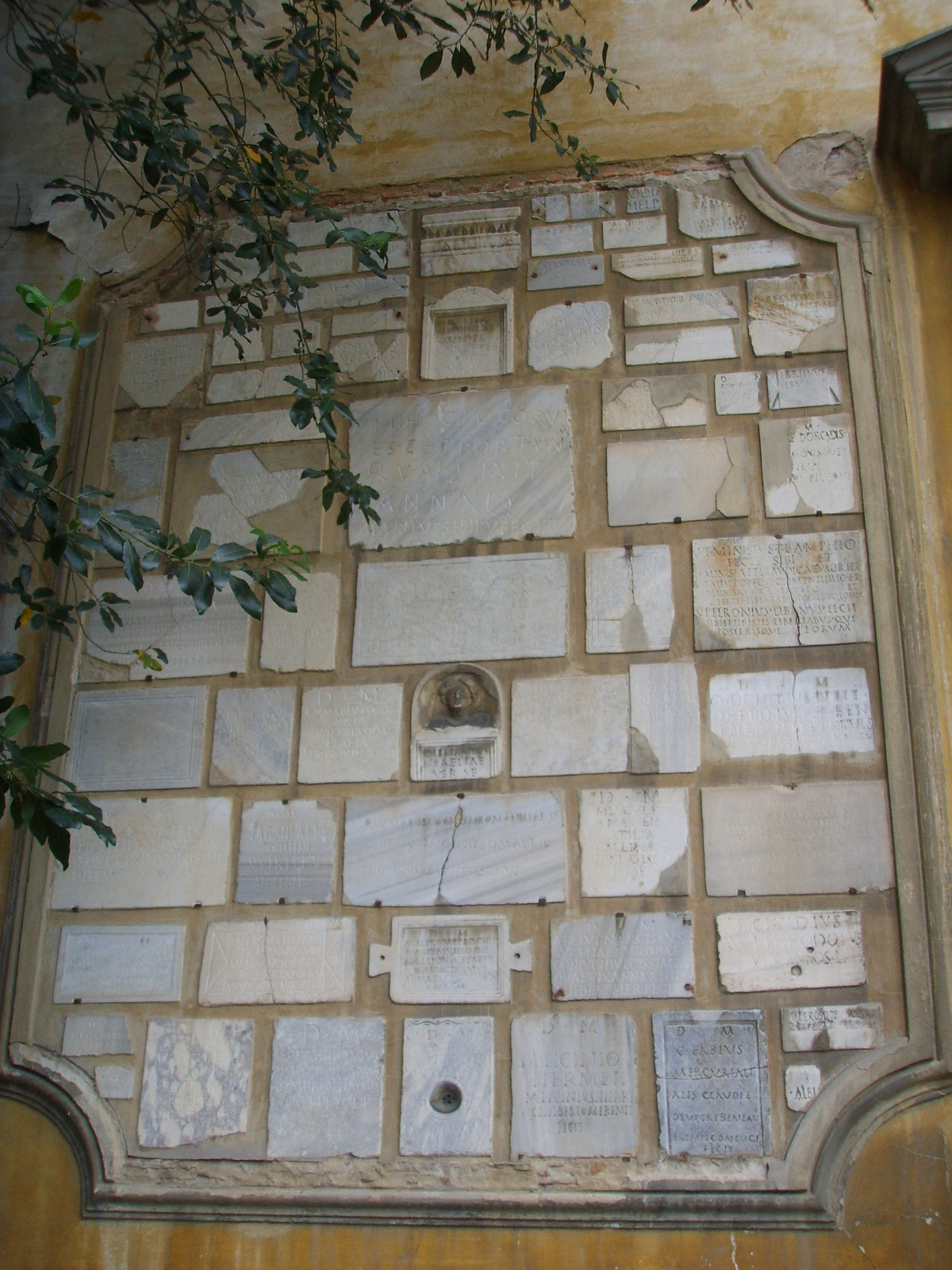 Casino corsini, lapidi antiche